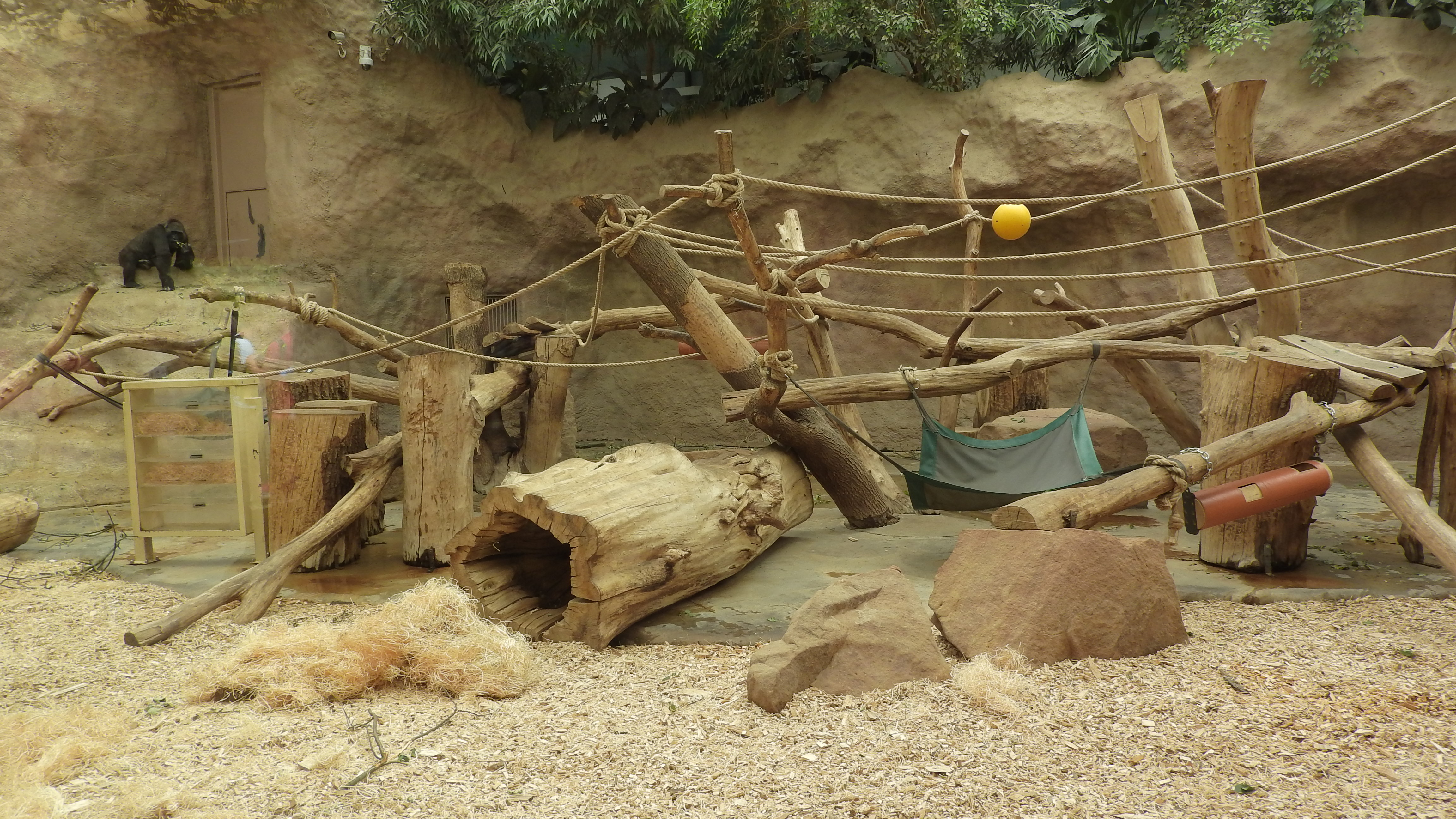 Vnitřní prostory gorilího pavilonu v Zoo Praha v létě 2018